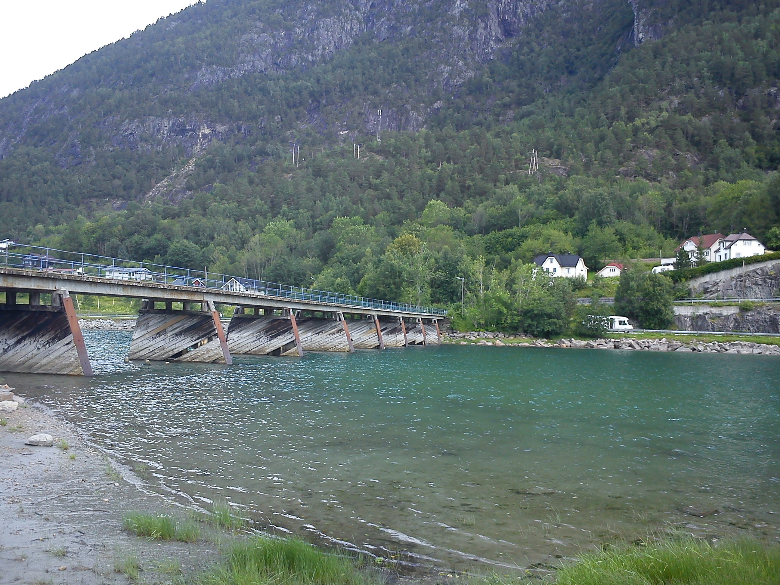 Rauma, Norway